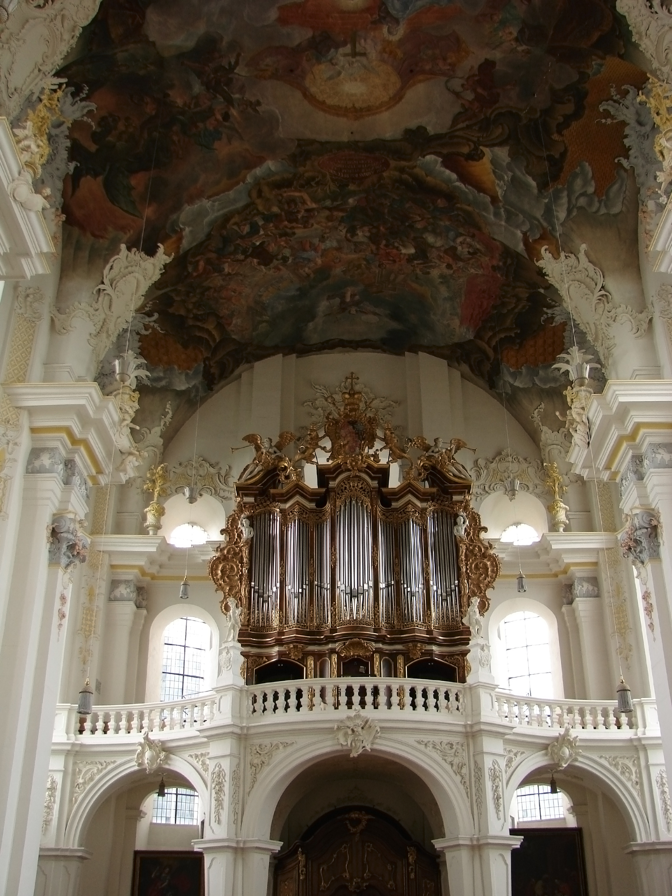 Orgues de l'église Saint-Paulin à Trèves.